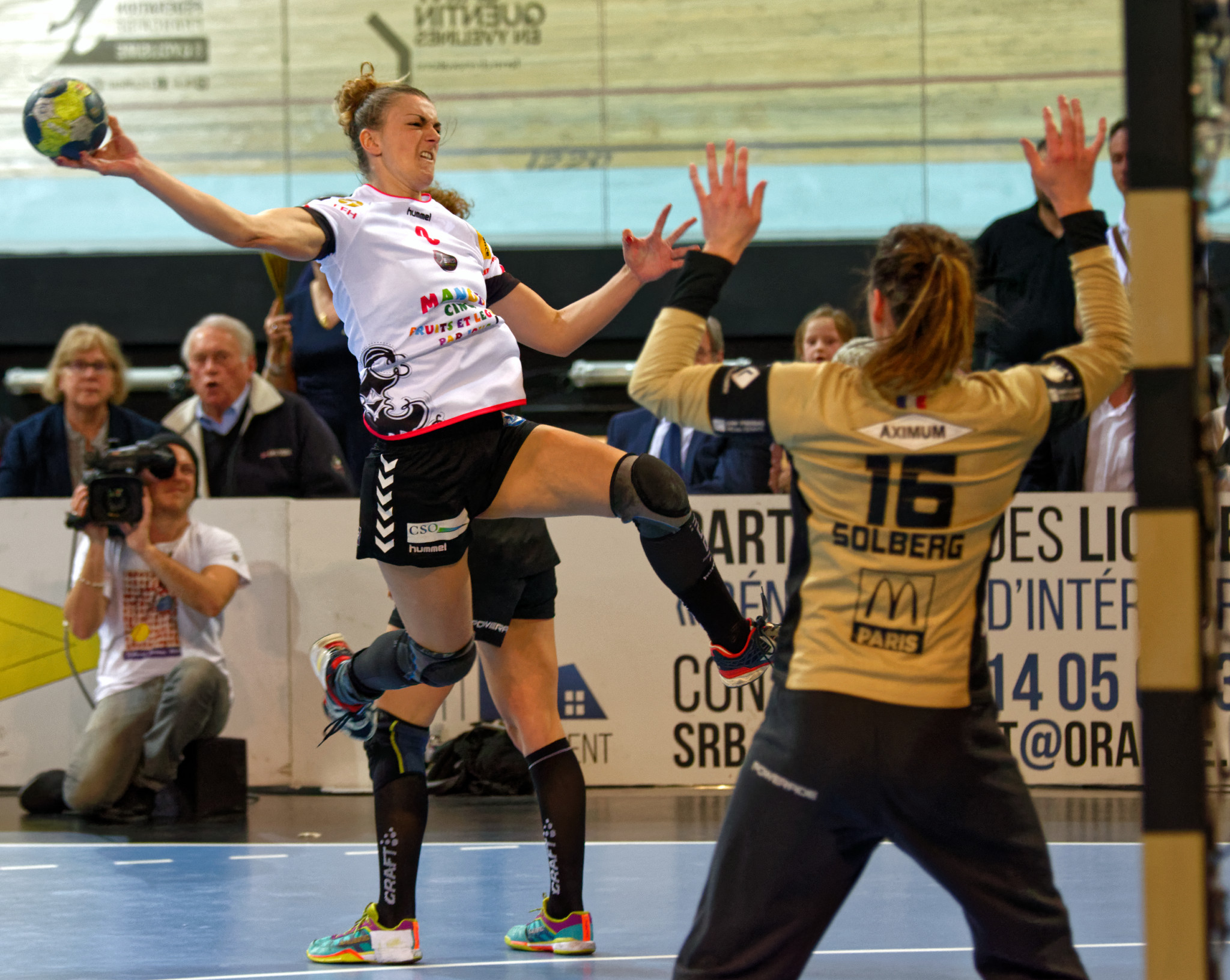 Rencontre de championnat entre Issy Paris et Brest. Au vélodrome de saint Quentin en Yvelines, le 25 mars 2017.